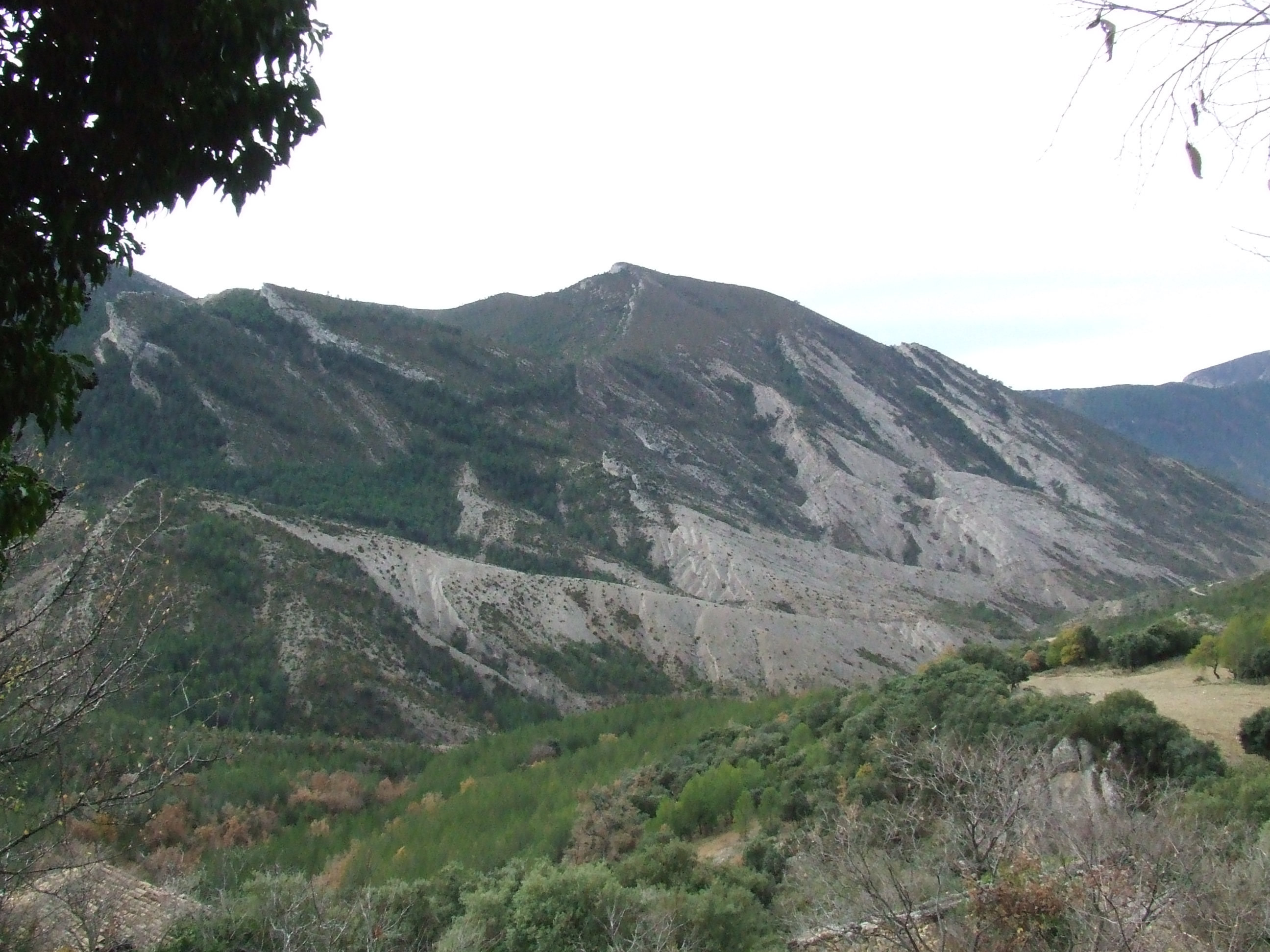 Sant Corneli, des d'Herba-savina (Hortoneda de la Conca, Conca de Dalt, Pallars Jussà)